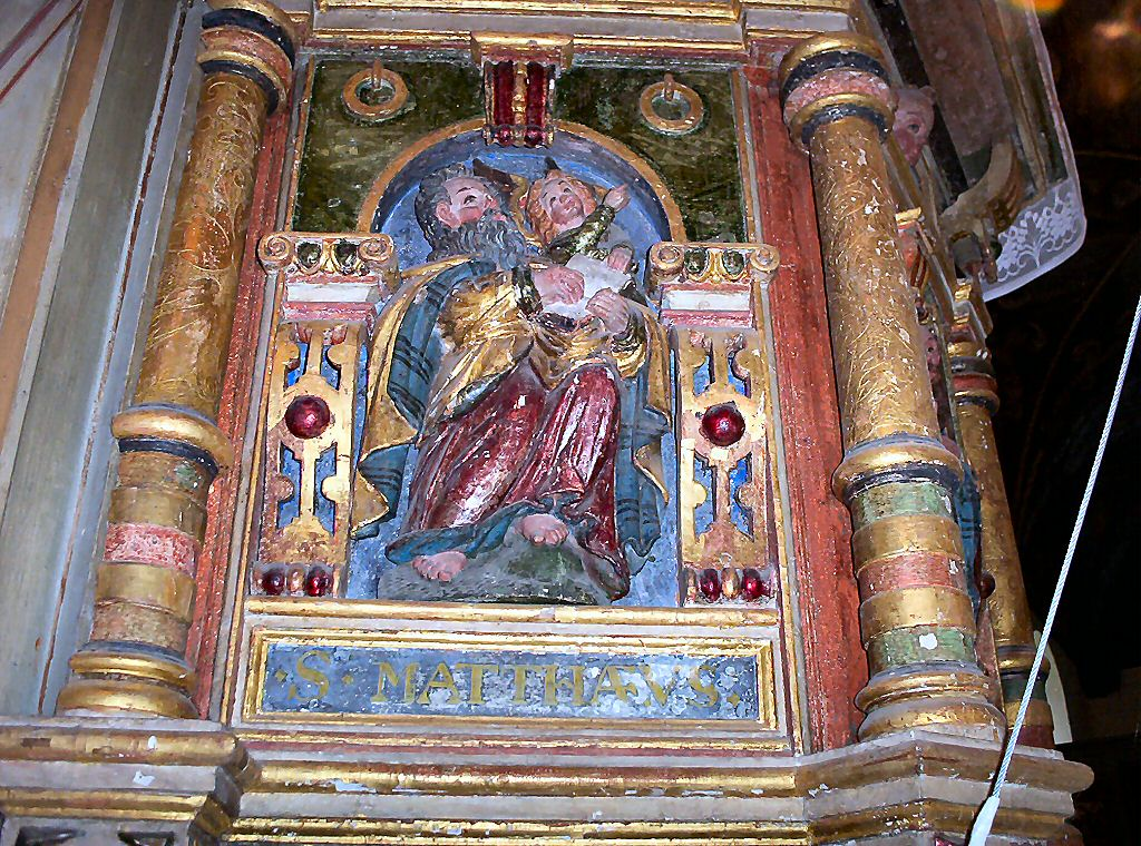 Kościół w Brzesku koło Pyrzyc - ambona